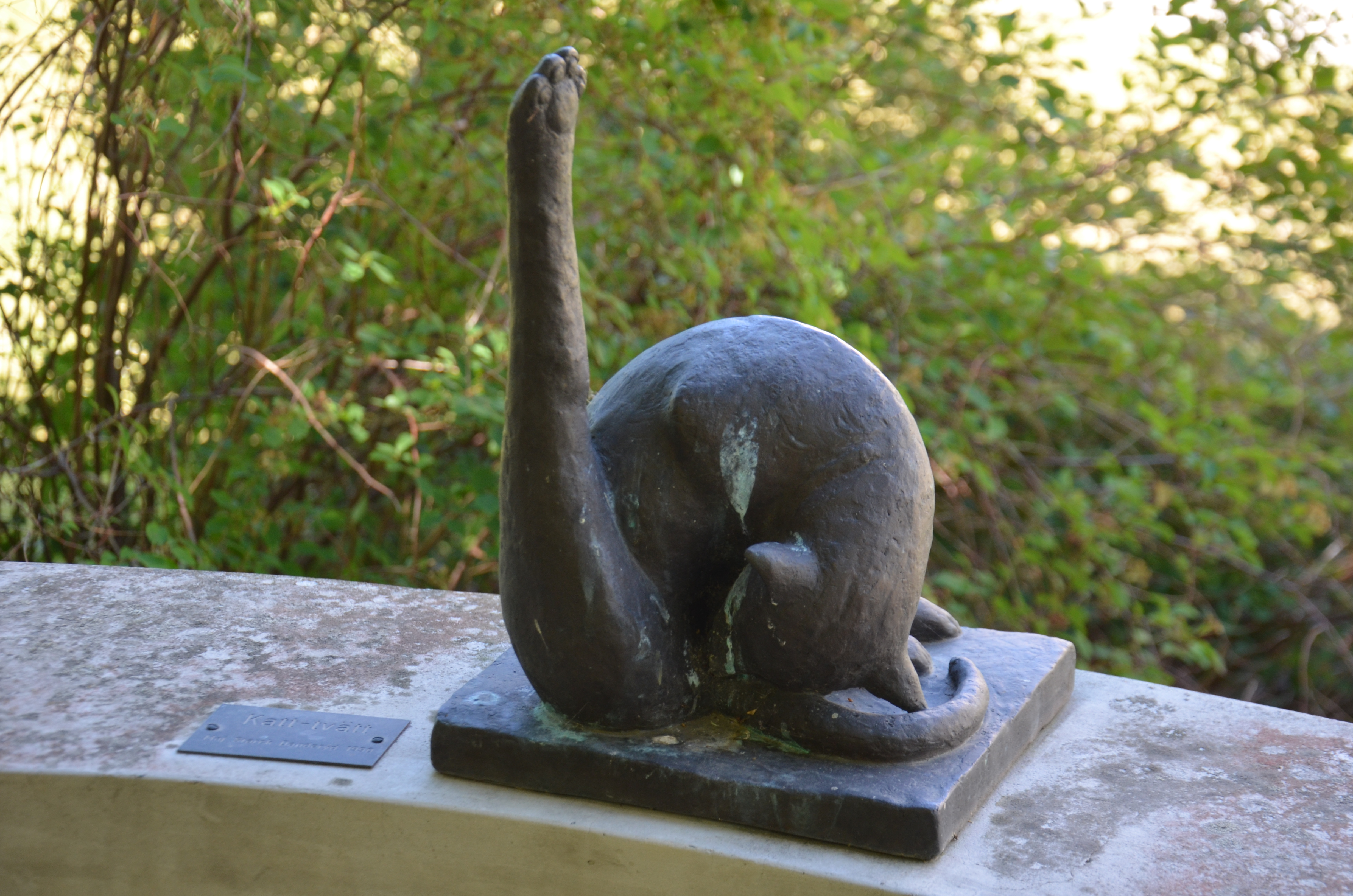 Maj Starcks Kattvätt på Kevinge pensionärsboende i Danderyd